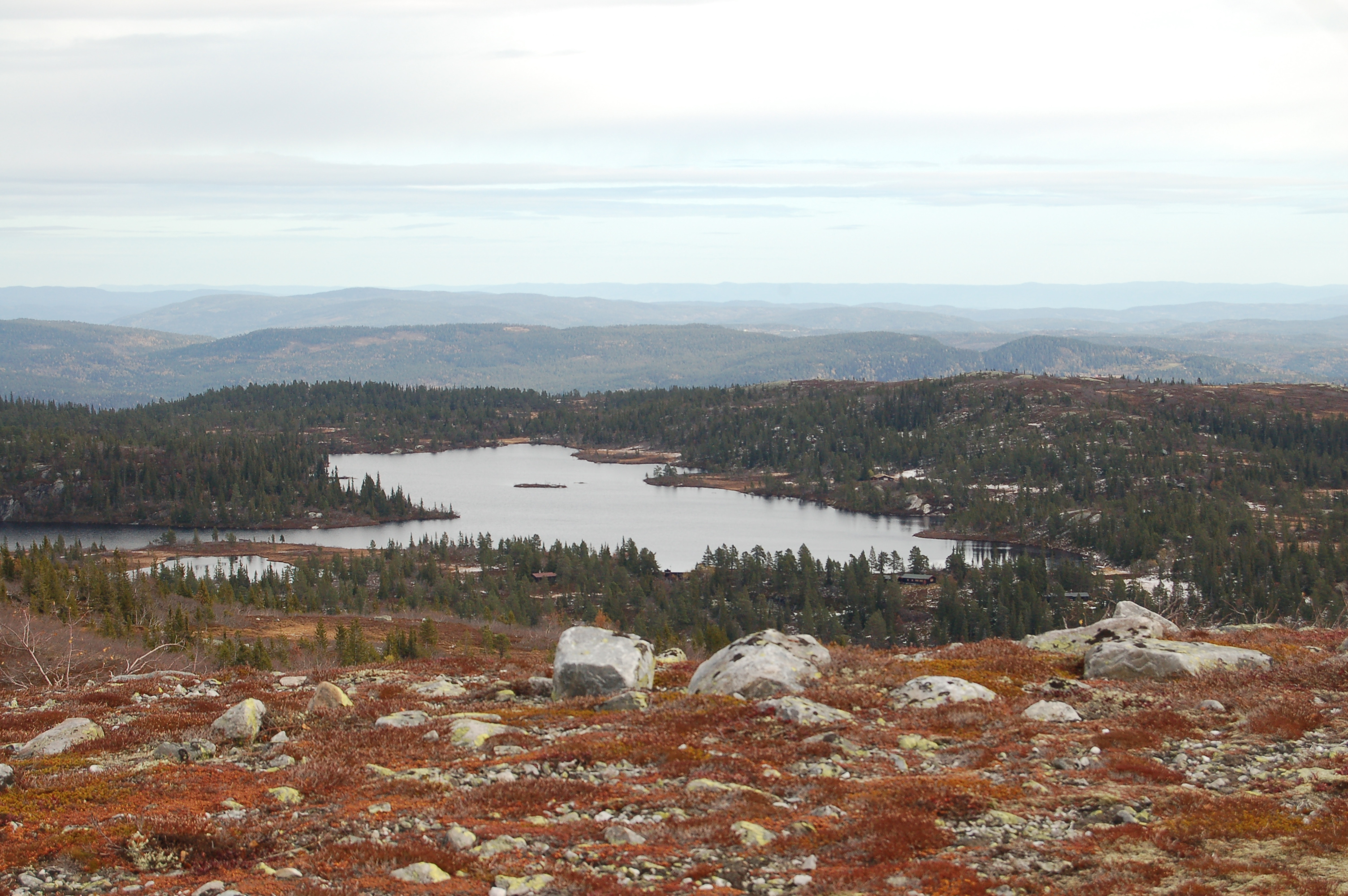 Fiskeløysen på Blefjell i Rollag kommune, Buskerud, Norway